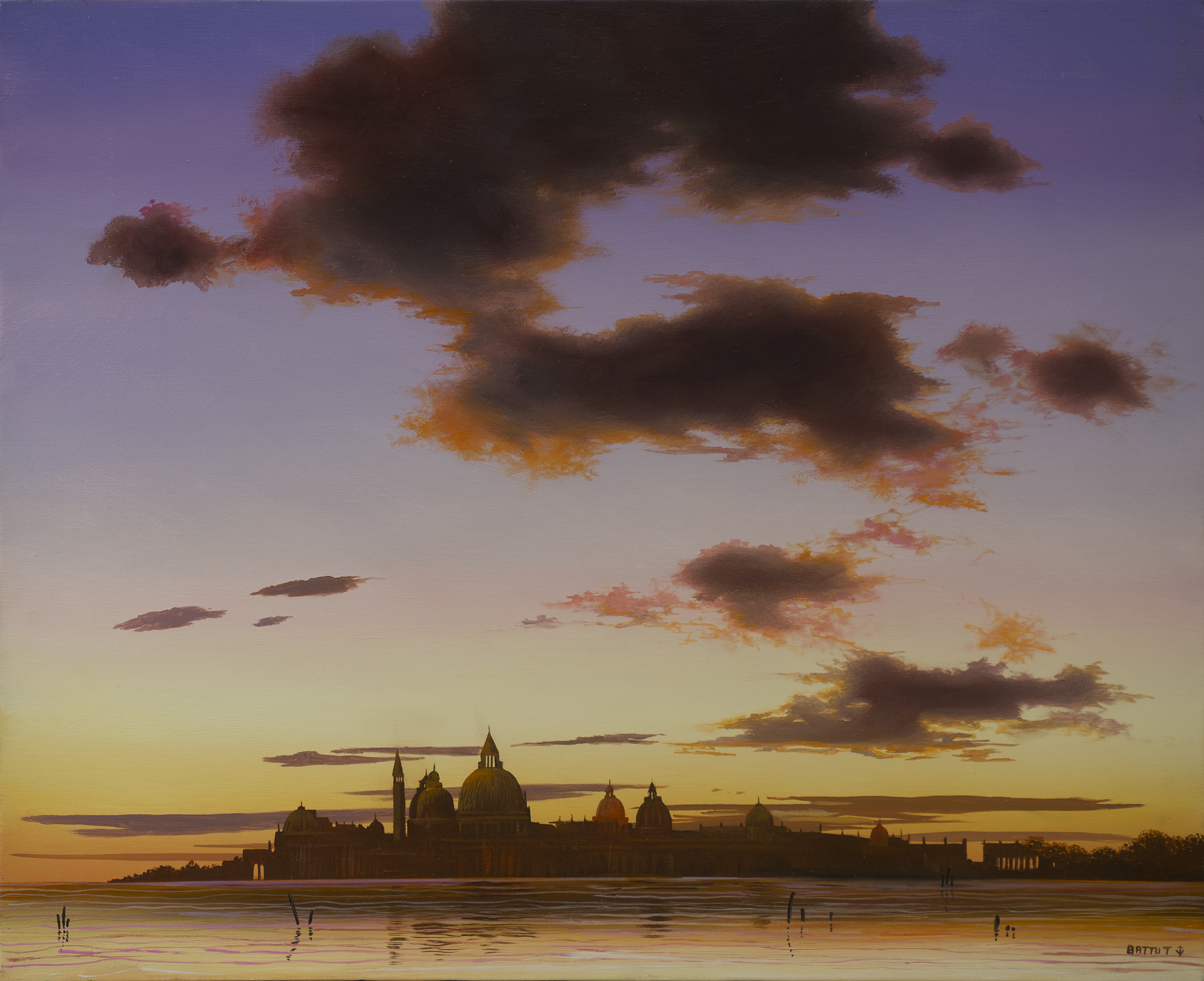 "Venise le soir" 46x55 cm